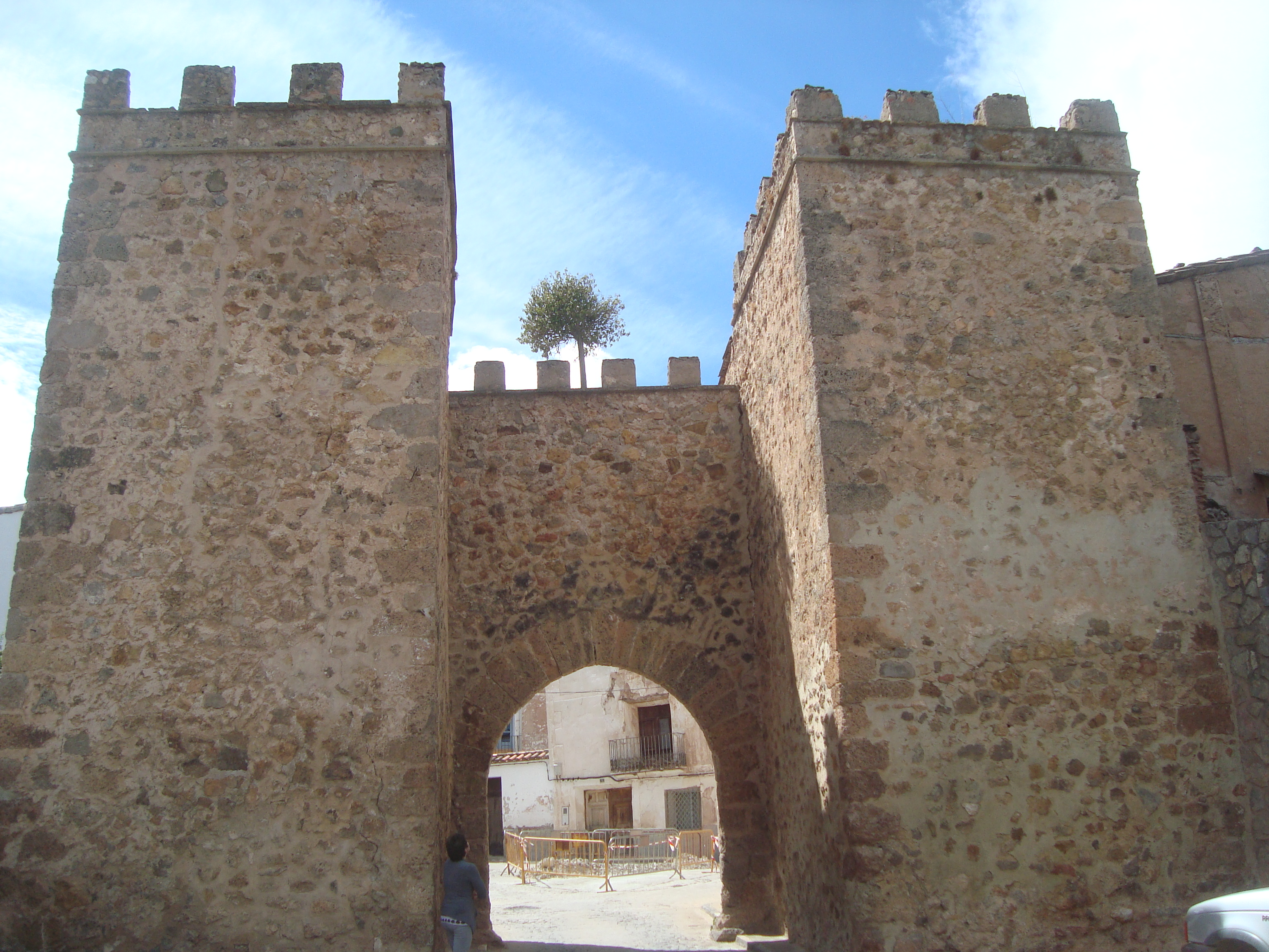 Castillo y muralla de Manzanera